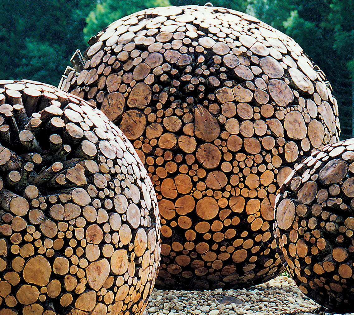 Von einem Emme-Hochwasser entwurzelte Erlen zusammengetragen und zu drei Kugeln zusammengebaut. Durchmesser: 250/200/125cm Ort: Kemmeriboden-Bad, CH-Schangnau